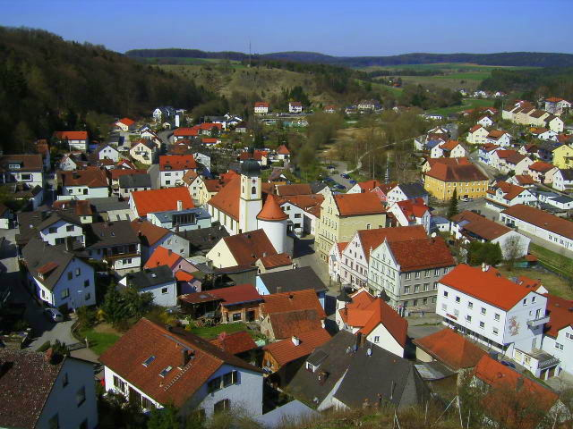 Panoramic view of Altmannstein, Altmühltal, Bavaria, Germany